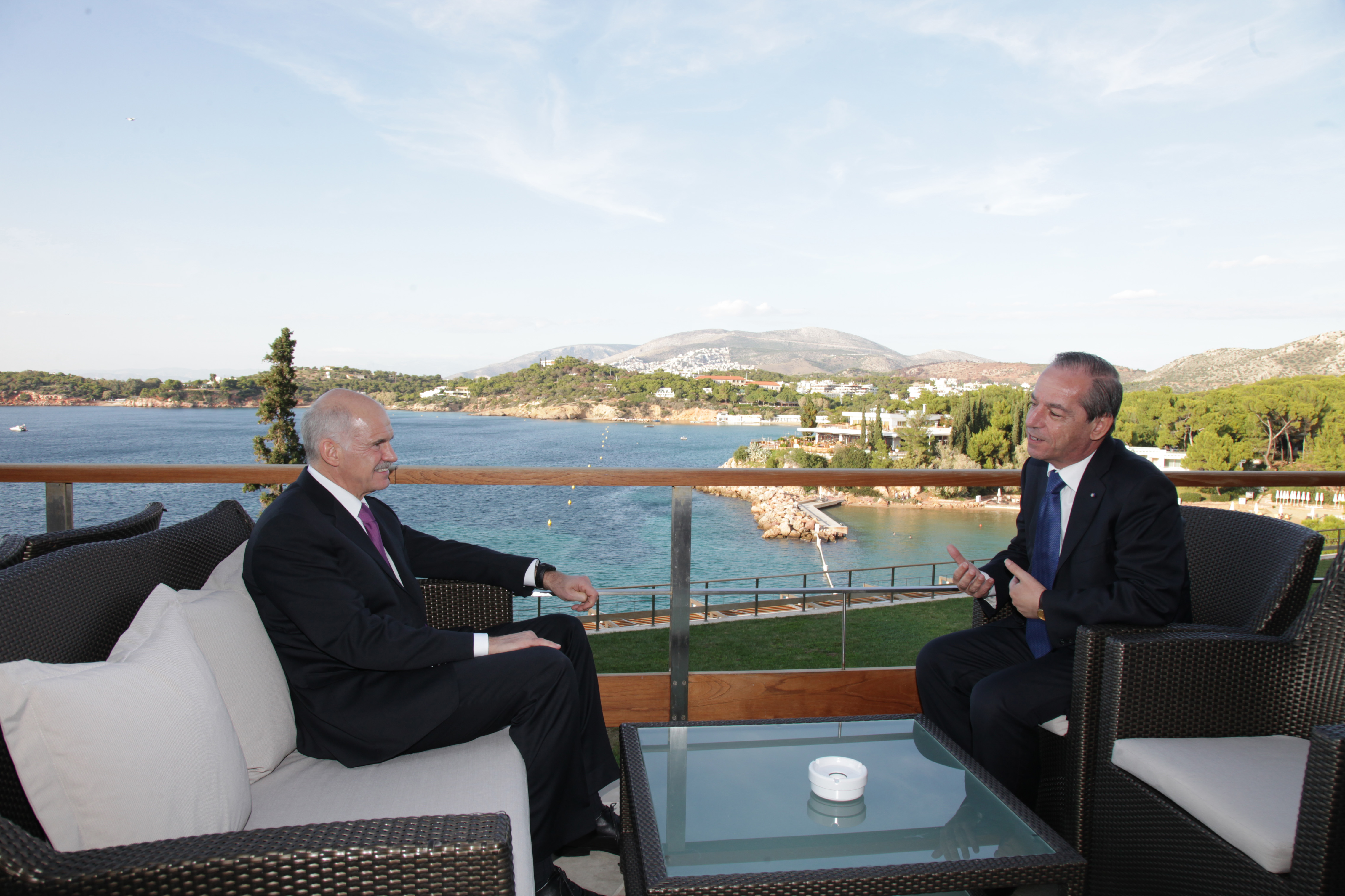 Μεσογειακή Πρωτοβουλία για την Κλιματική Αλλαγή - Συνάντηση με τον Πρωθυπουργό της Μάλτας, Lawrence Gonzi